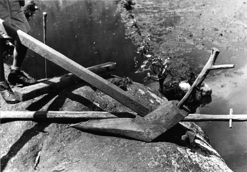 Tschungtang, Pflug für Reisfelder